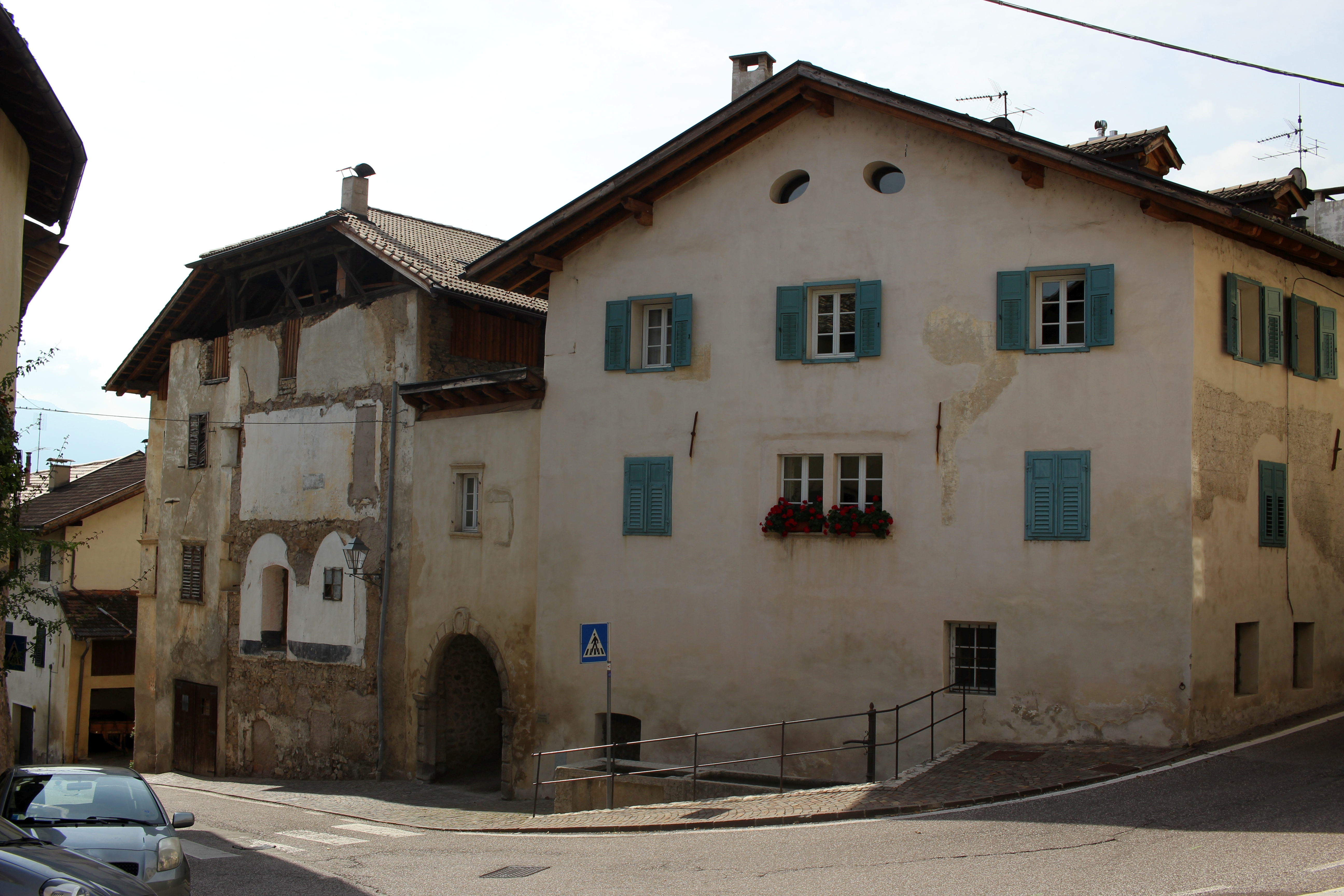 Ansitz Freienfeld mit Nebengebäuden in Kurtatsch